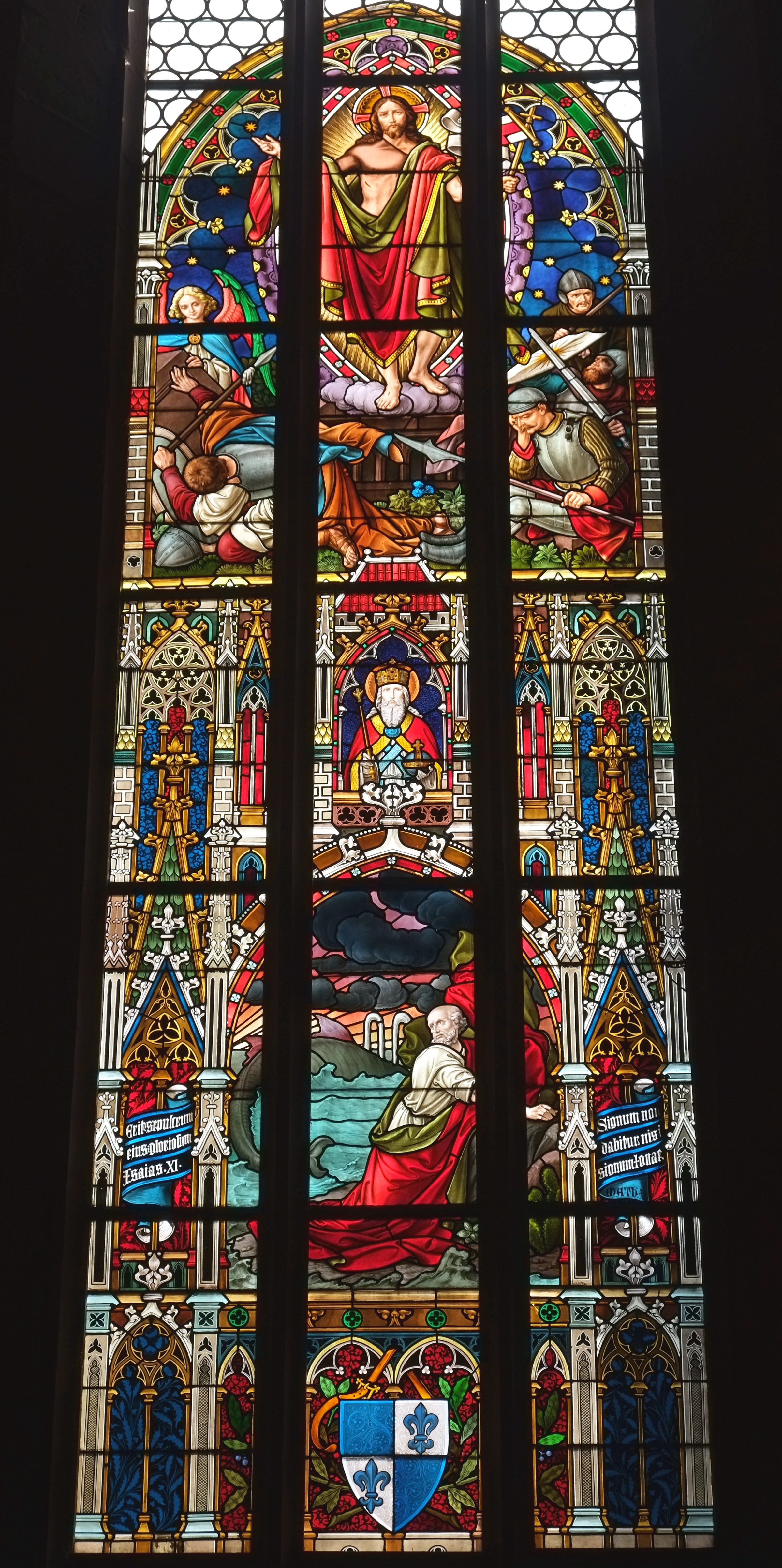 Bleiglasfenster in der katholischen Pfarrkirche St. Andreas in Karlstadt im Main-Spessart-Kreis (Bayern, Deutschland)